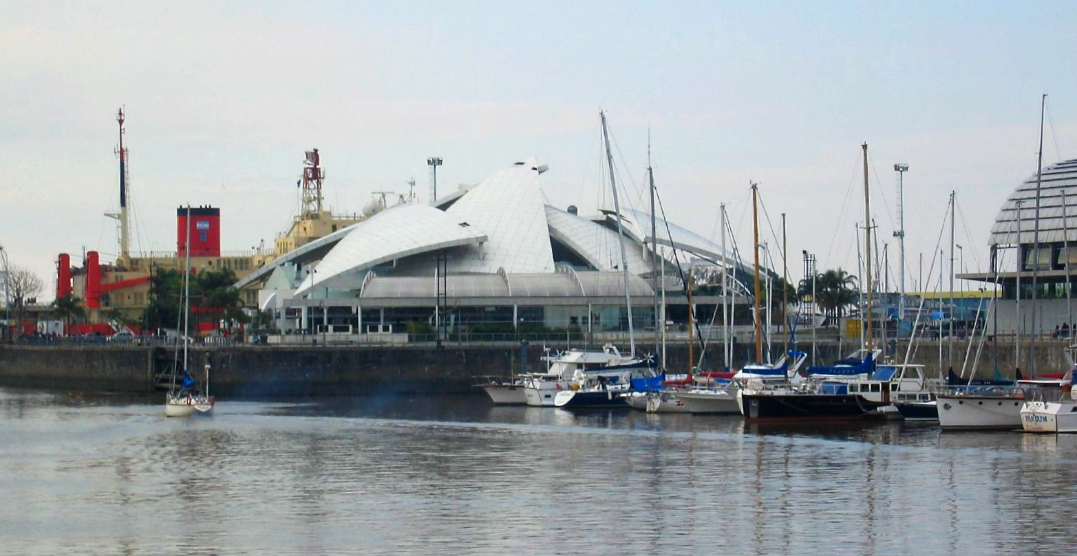 Fotografía Discoteca Divino (u Opera Bay) en Puerto Madero, Buenos Aires, Argentina. Inaugurado en 1997 y demolido en el 2006, hoy se encuentra en el predio el edificio de oficinas Madero Riverside (MRA+A, 2013-15).Com cara de Sidney